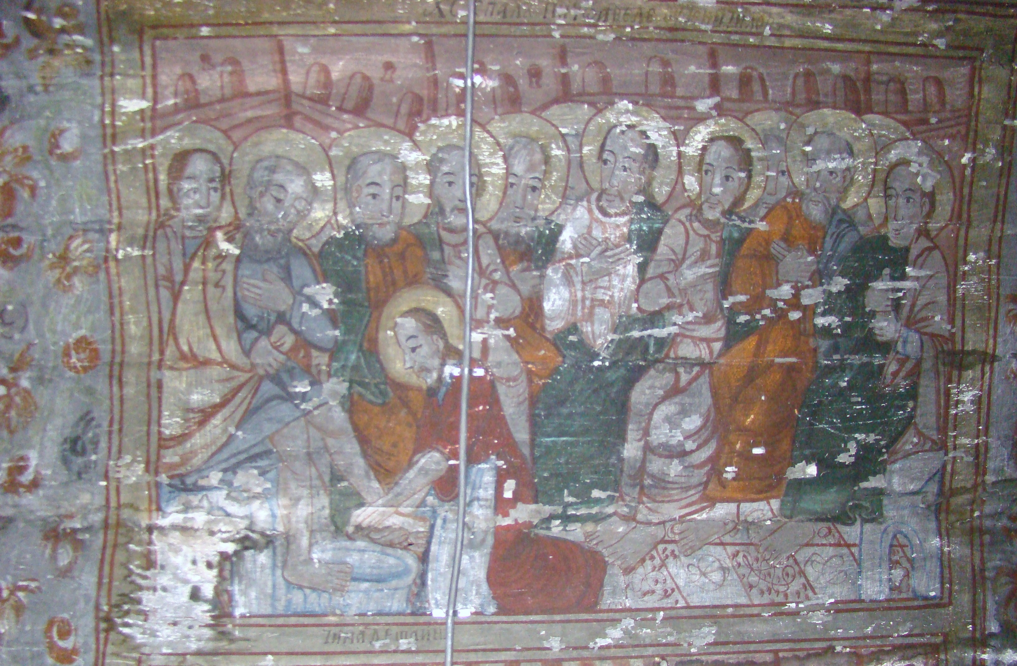 Biserica Sfinţii Arhangheli, Sat Brusturi, Comuna Creaca, județul Sălaj